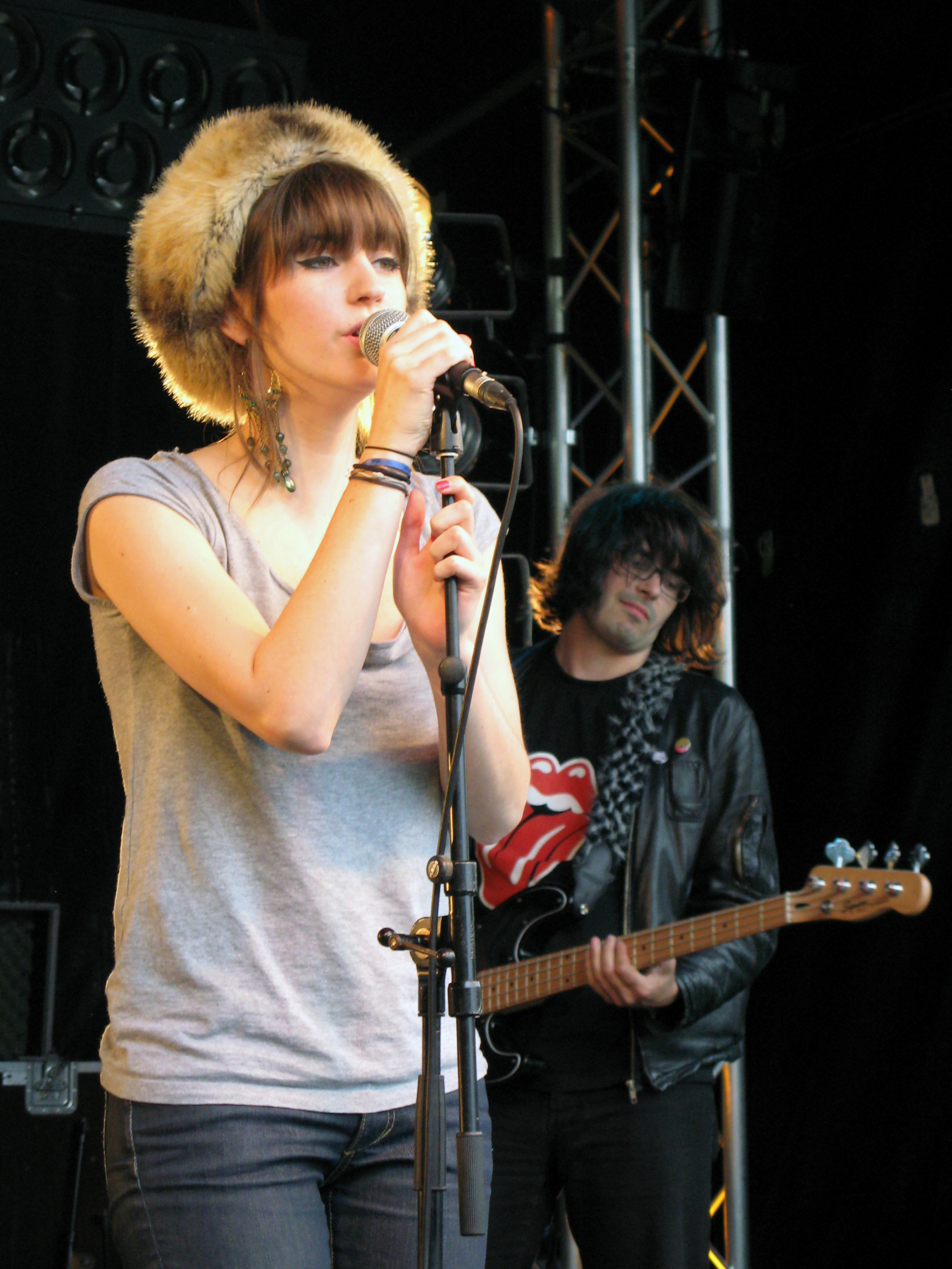 Revelles (Somme, France) - Série de 8 concerts gratuits organisés par l'association R4 pour les « 11èmes Rencontres Rock'n Roll à Revelles ». Le 5ème groupe au programme, "French Kiss", joue son premier morceau. .